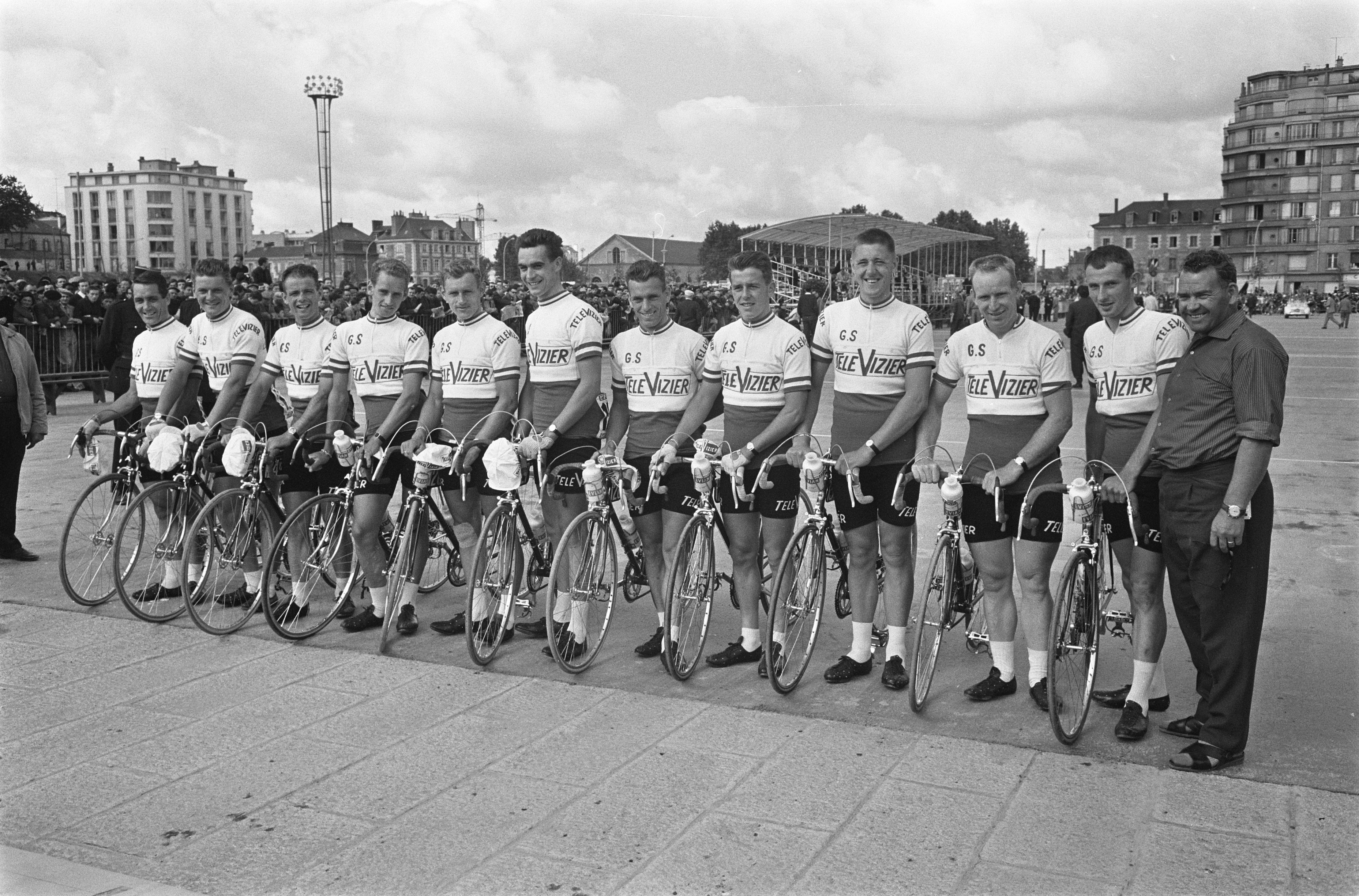 51ste Tour de France 1964, presentatie Televizierploeg. F.l.t.r.: Piet Damen, Jo de Haan, Cees Haast, Alphonse Steuten, Henk Nijdam, André van Aert, Jos van der Klundert, Leo van Dongen, Cees van Espen, Piet van Est, Rik Wouter, ganz rechts: Kees Pellenaars